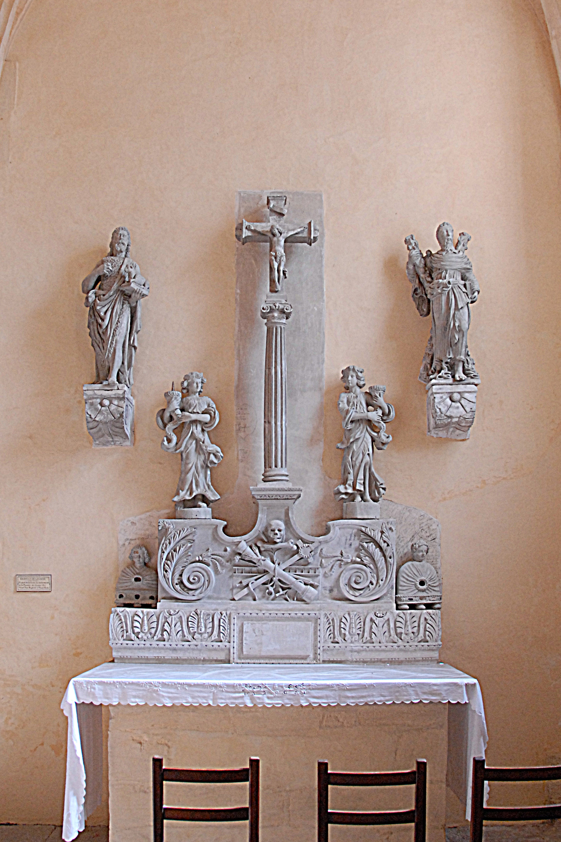 St-Vorles de Châtillon-s-S, Altar Heiligkreuzkapelle